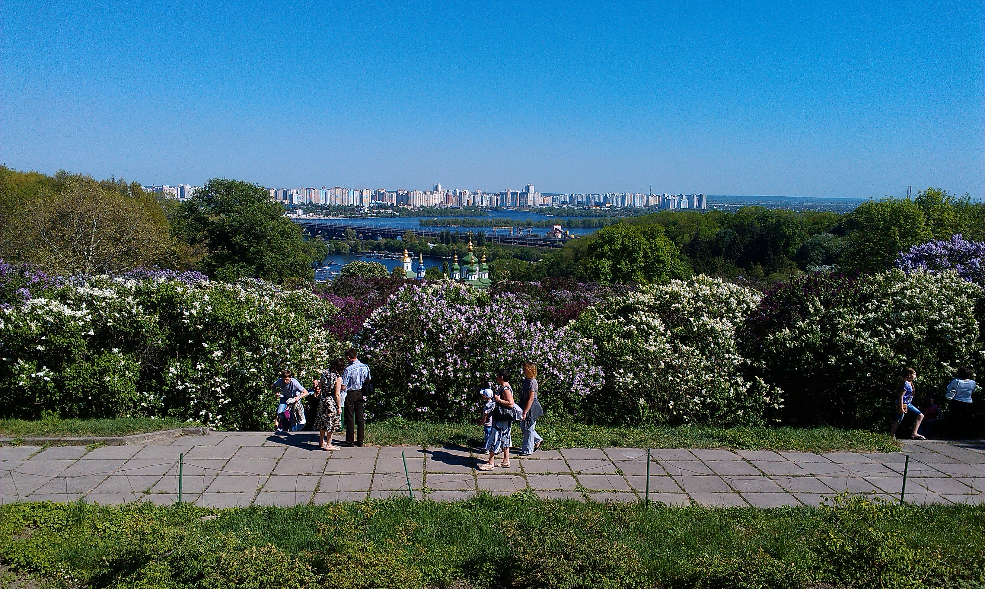 Бузкова колекція та вид на Дніпро у ботсаду ім.Гришка